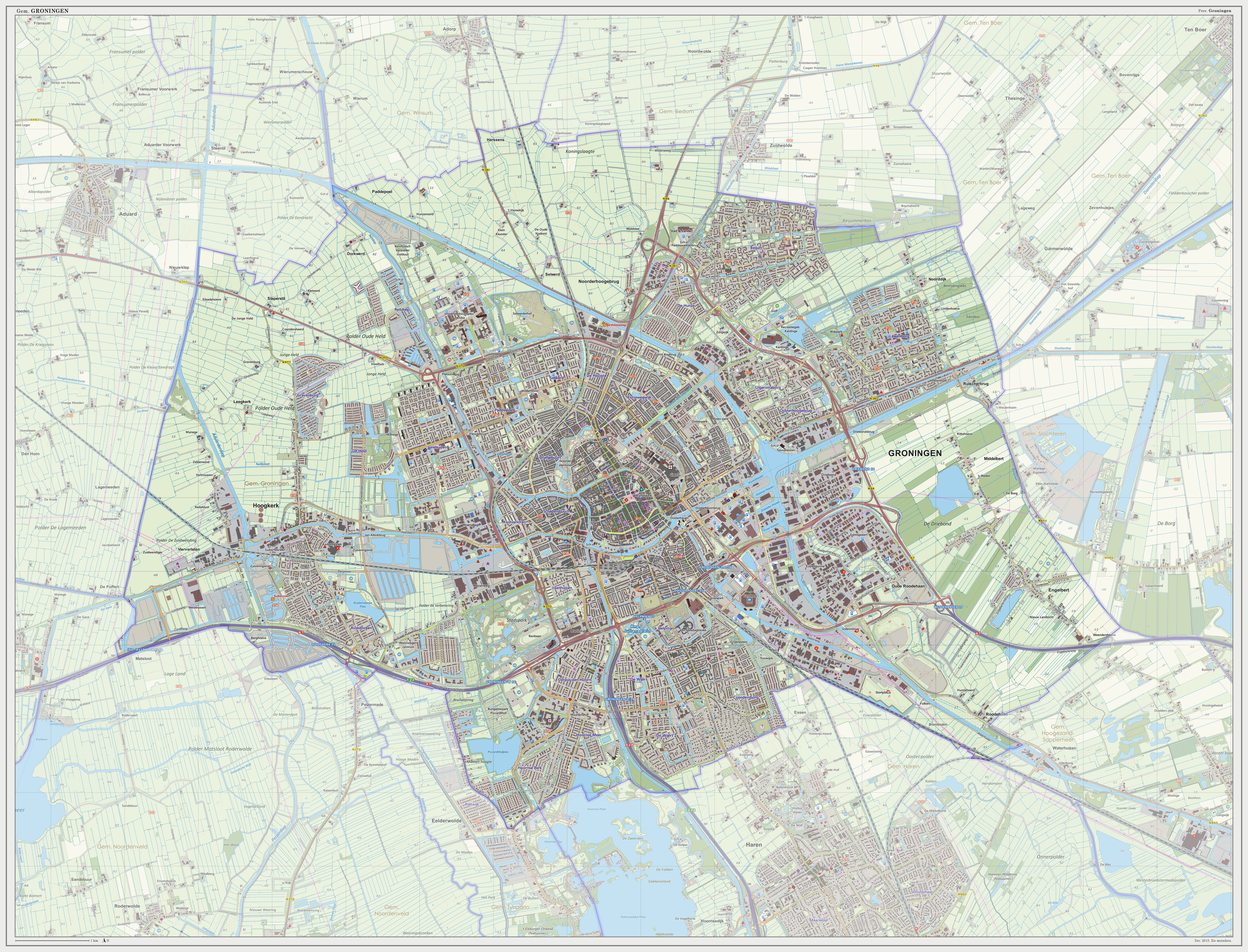 Topografische gemeentekaart. Resolutie: 300 pixels/km. Kaartbeeld samengesteld met de open geodata van de Top10NL en Top25namen (Basisregistratie Topografie, Kadaster 30-nov-2013), o.b.v. Creative Commons BY licentie. Gebouwvlakken uit Open Geodata BAG extract (8-dec-2013). Wegen uit de OpenStreetMap (15-dec-2013). Samenstelling en kleurenschema: Jan-Willem van Aalst, met QGIS2 en Adobe Photoshop. Zie ook de Legenda.